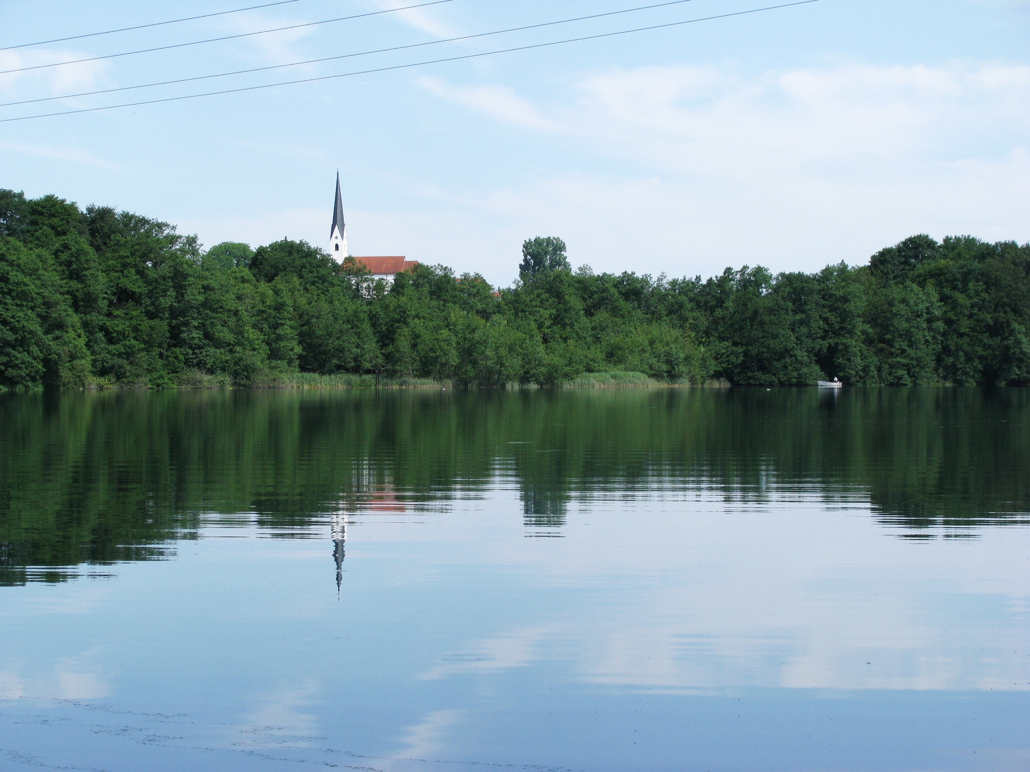 Schloßsee vom Garten des Schlosses Hartmannsberg aus gesehen; jenseits des Sees die kath. Filialkirche St. Rupertus und St. Laurentius in Stephanskirchen (Bad Endorf)